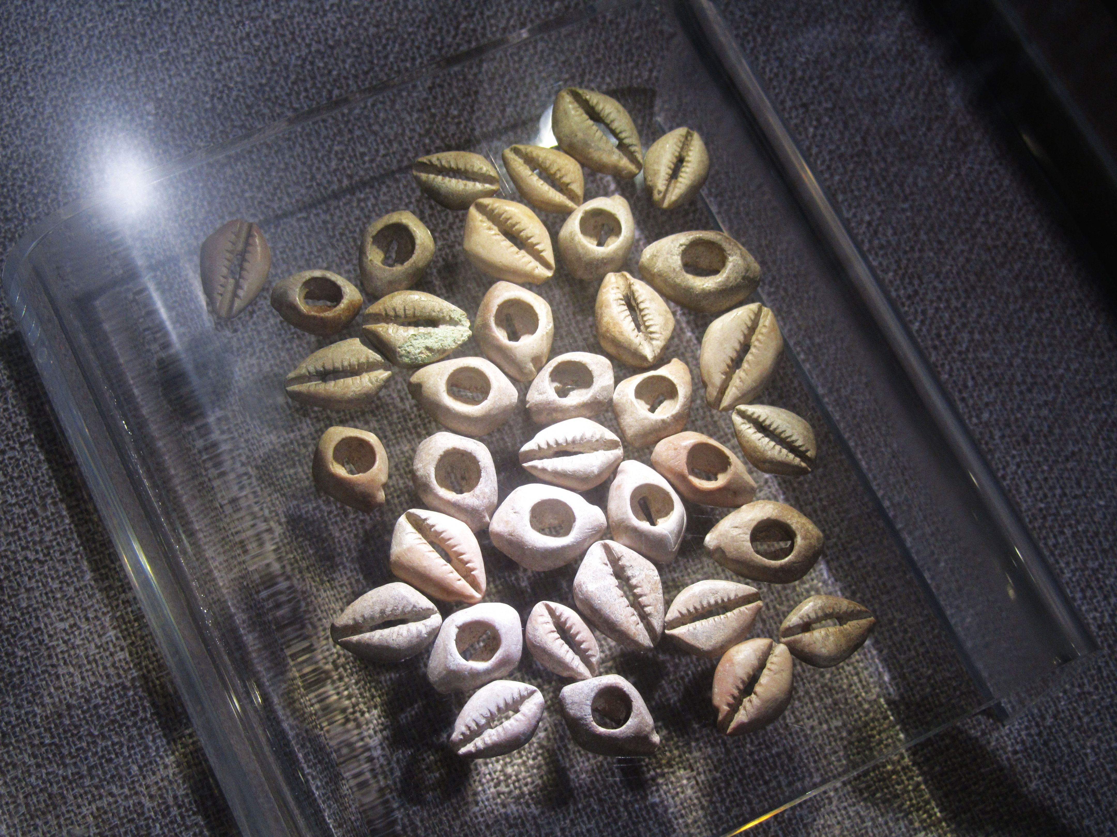 绍兴地区出土的贝币。